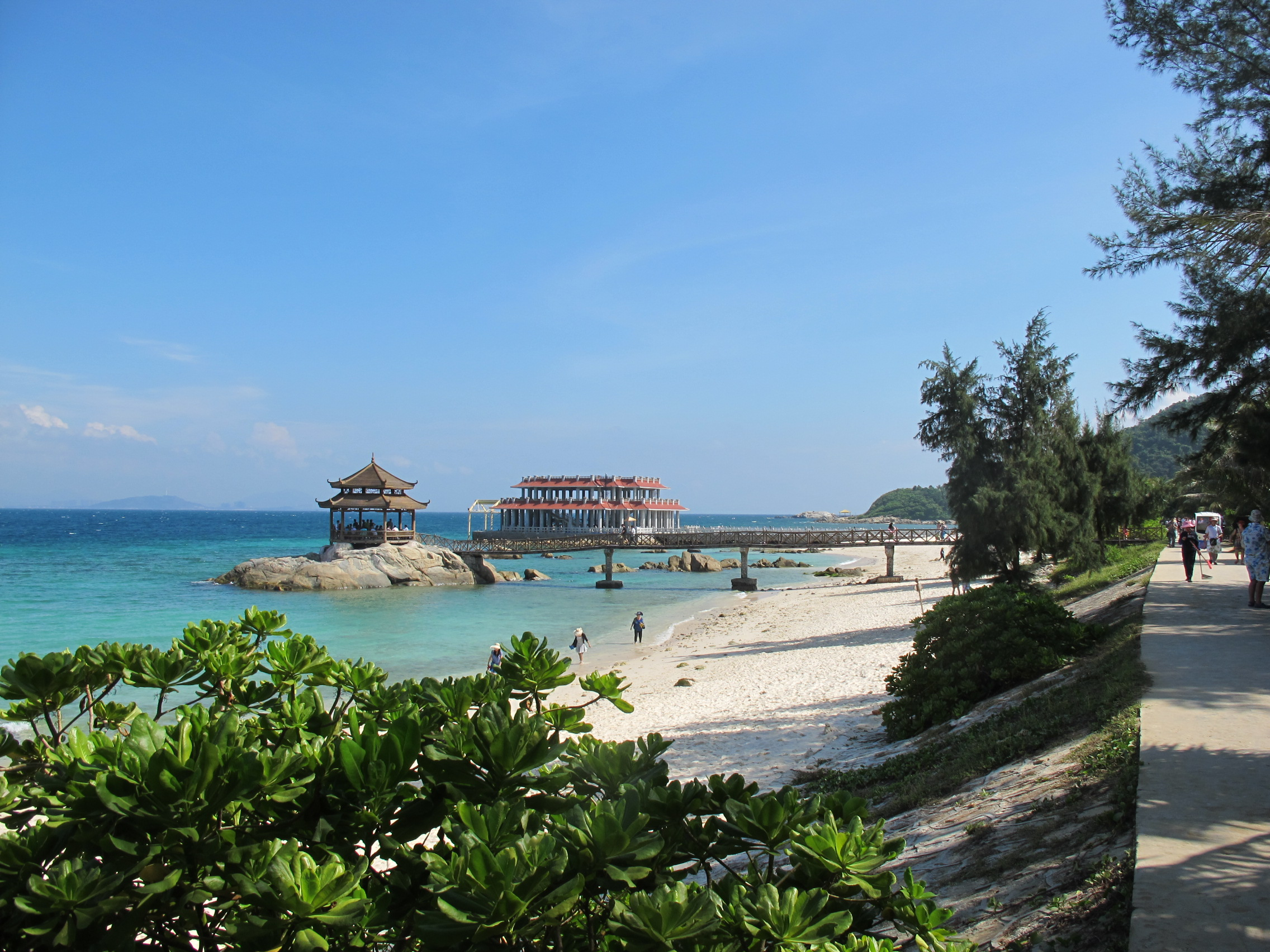 蜈支洲岛情人桥与夏季码头